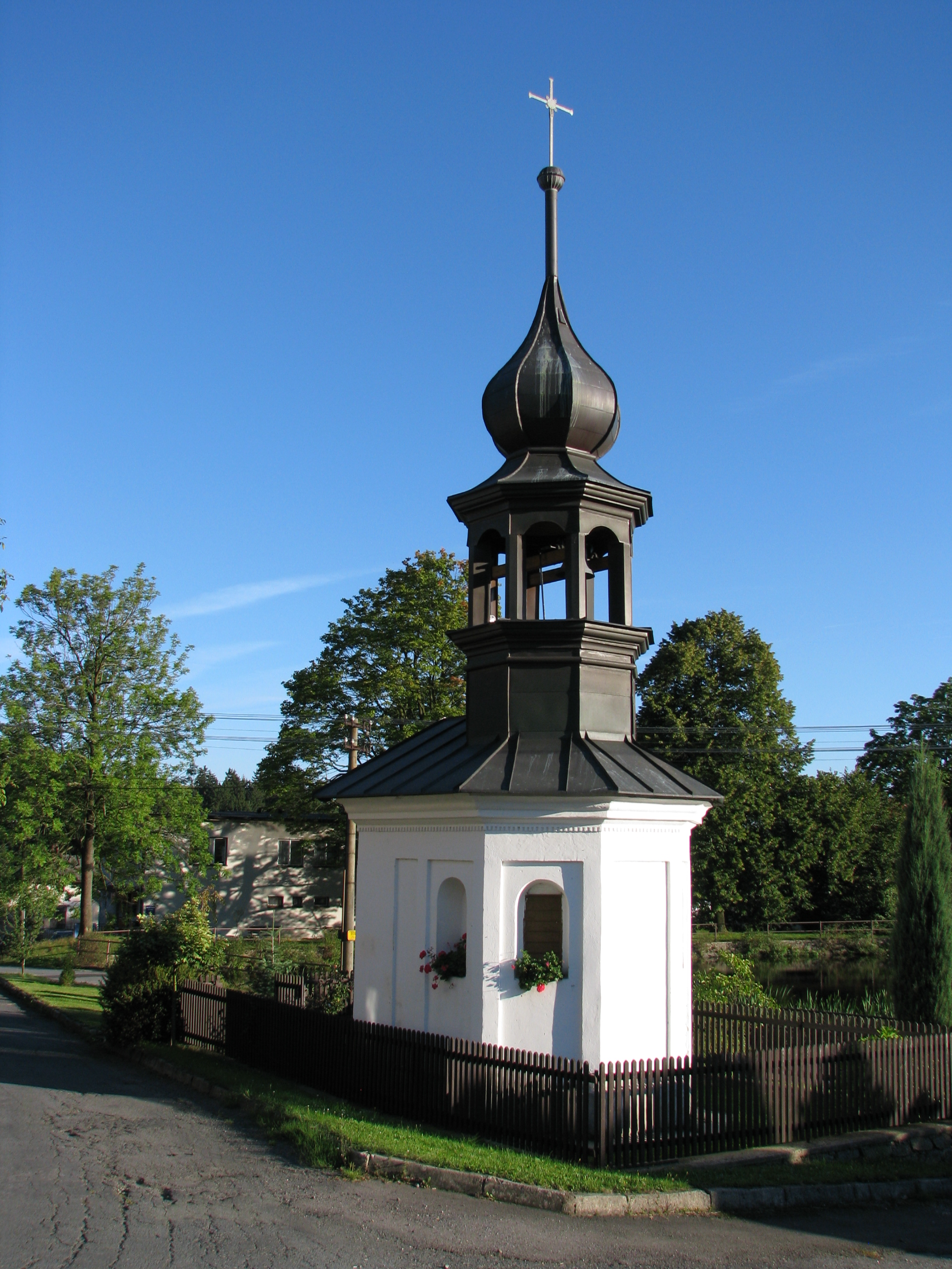 Kaplička (Petrovice), náves, Petrovice